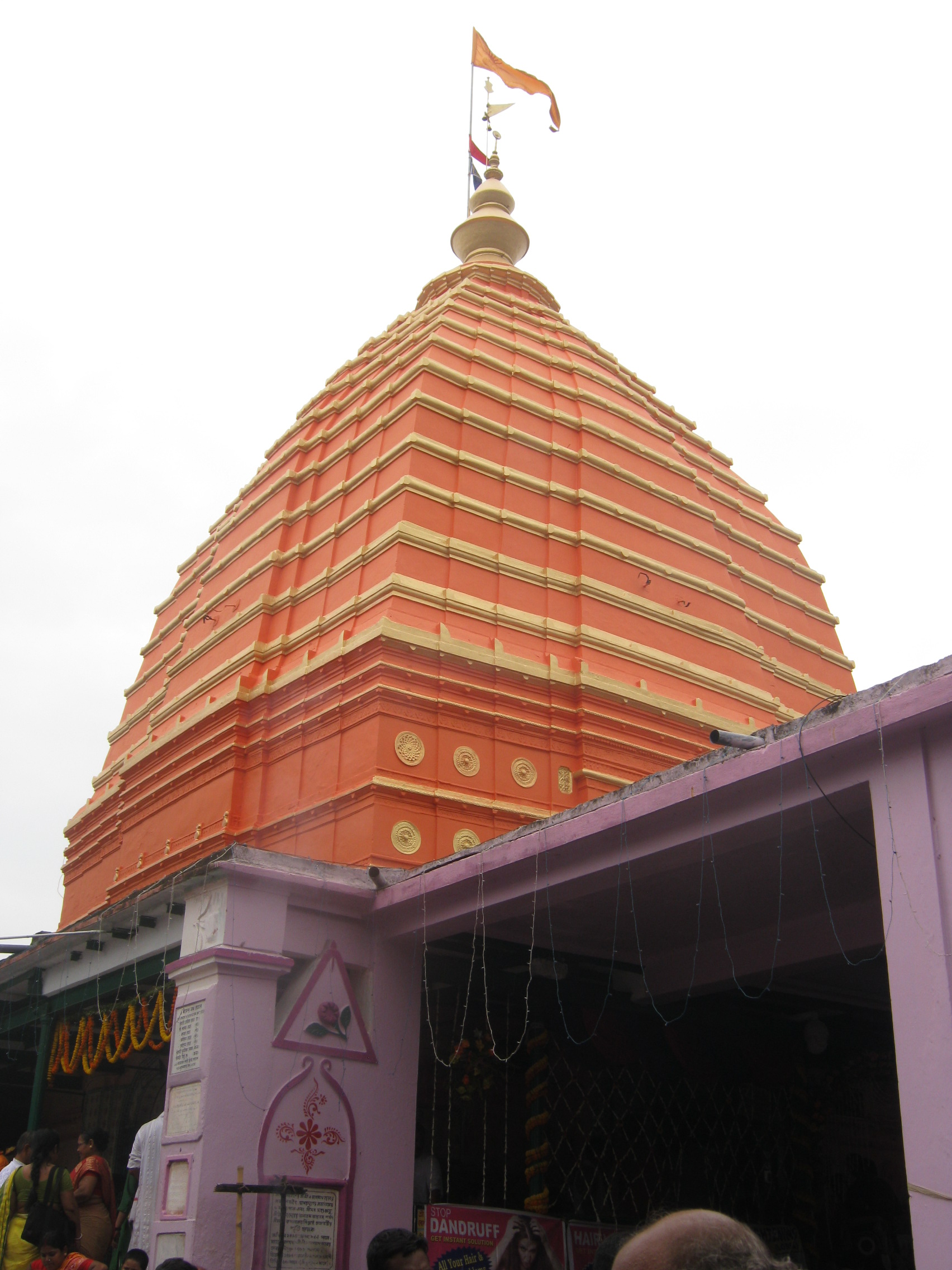 Jagannath Temple,Mahesh, Serampore- 2(712202) ESTD-1396 AD